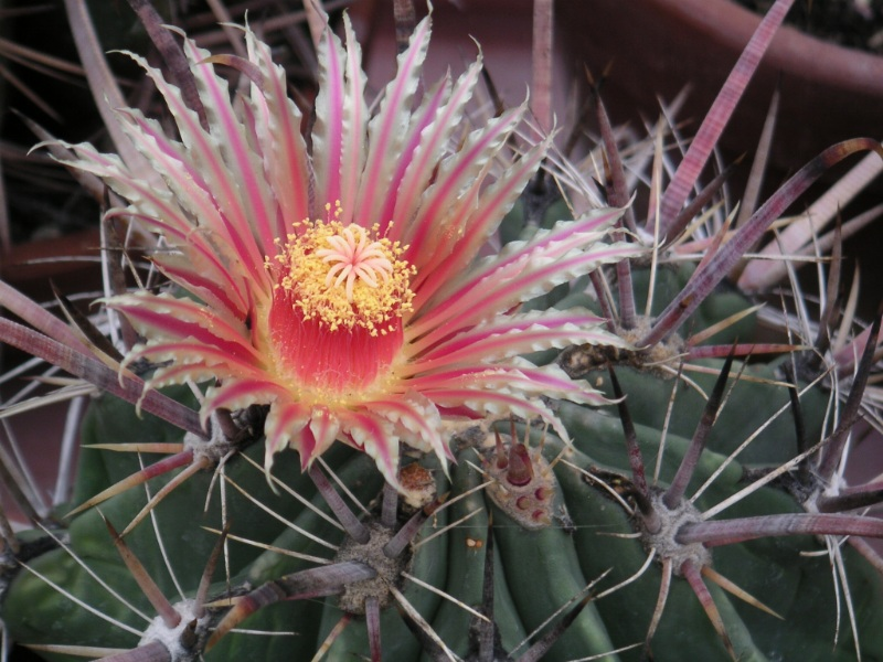 Description: Ferocactus sp., août 2004, collection personnelle Source: Jean-Jacques MILAN Licence: GFDL Jean-Jacques MILAN